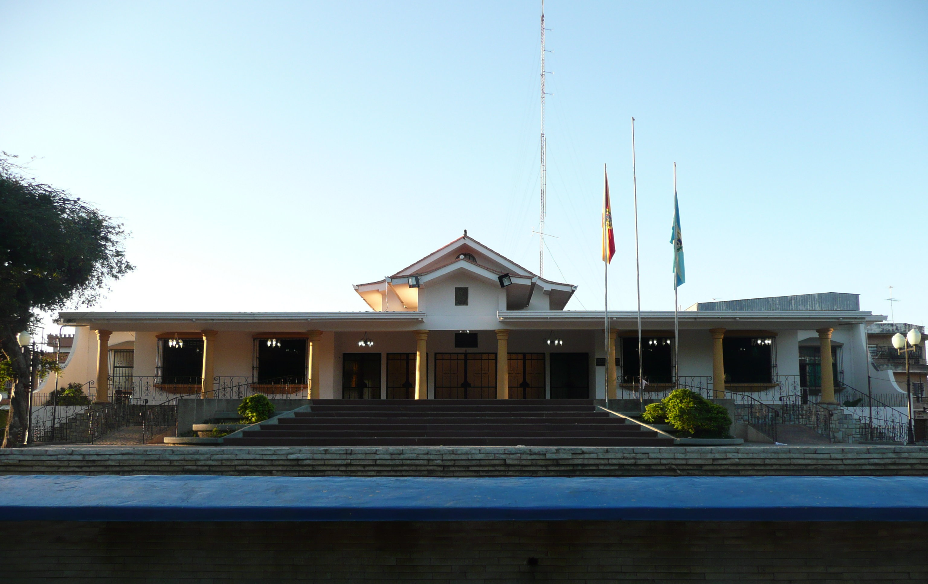 Antigua alcaldía del Municipio Mariño, Turmero, Estado Aragua, Venezuela.